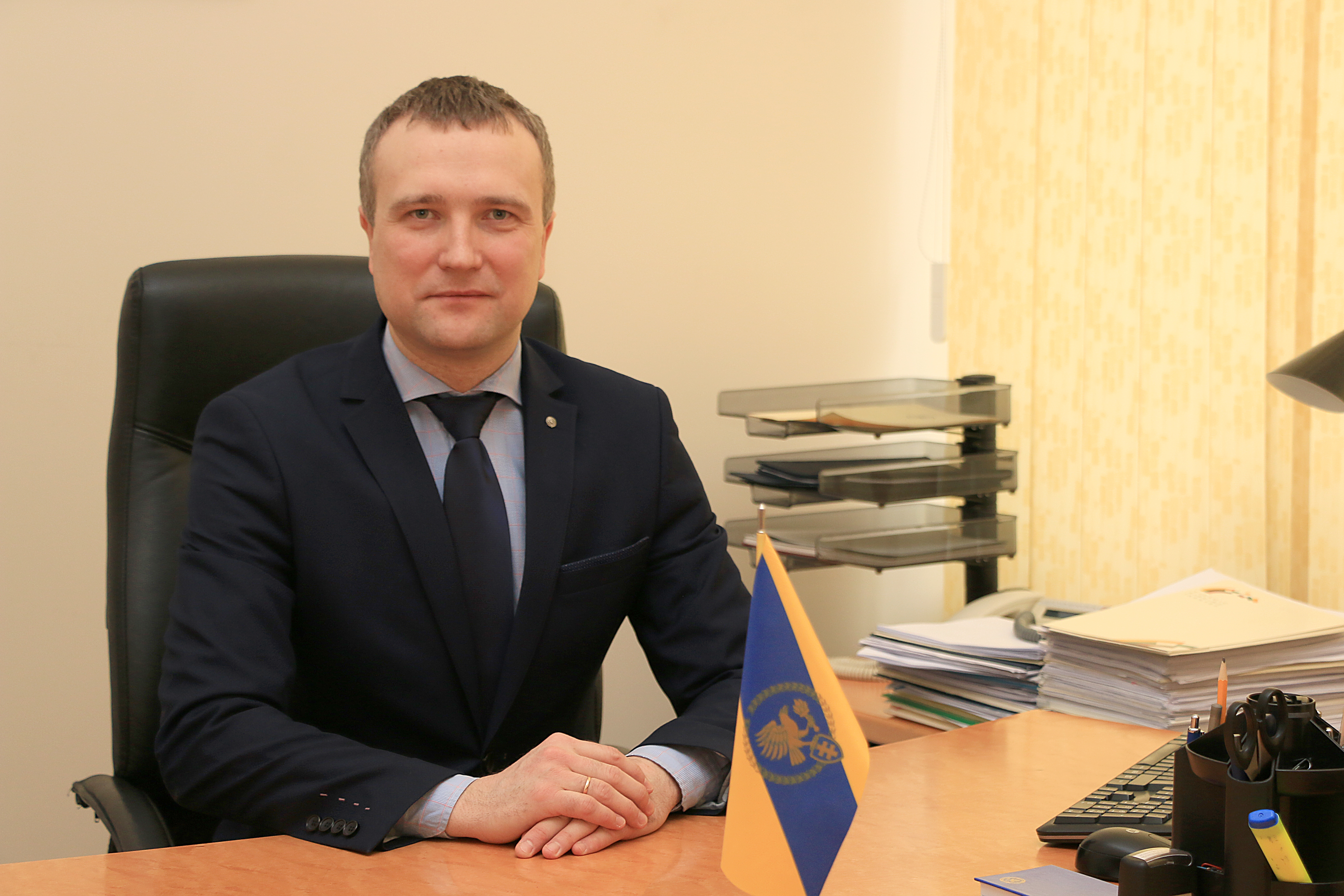 STT direktoriaus pavaduotojas